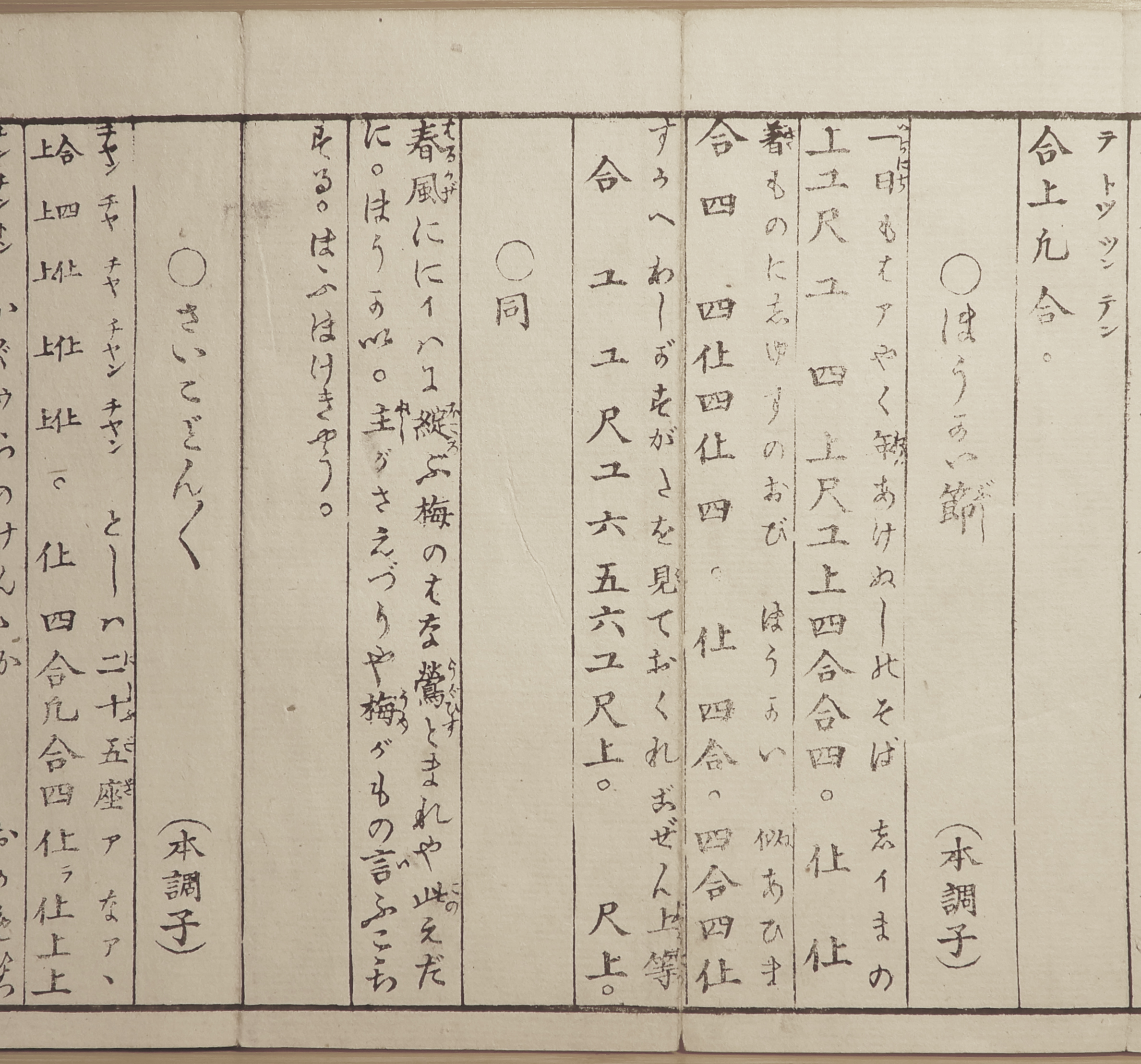 鈴木萬次郎『月琴雑曲独稽古』1897年刊(折り本)に載せる「ほうかい節」(法界節)の工尺譜と歌詞。